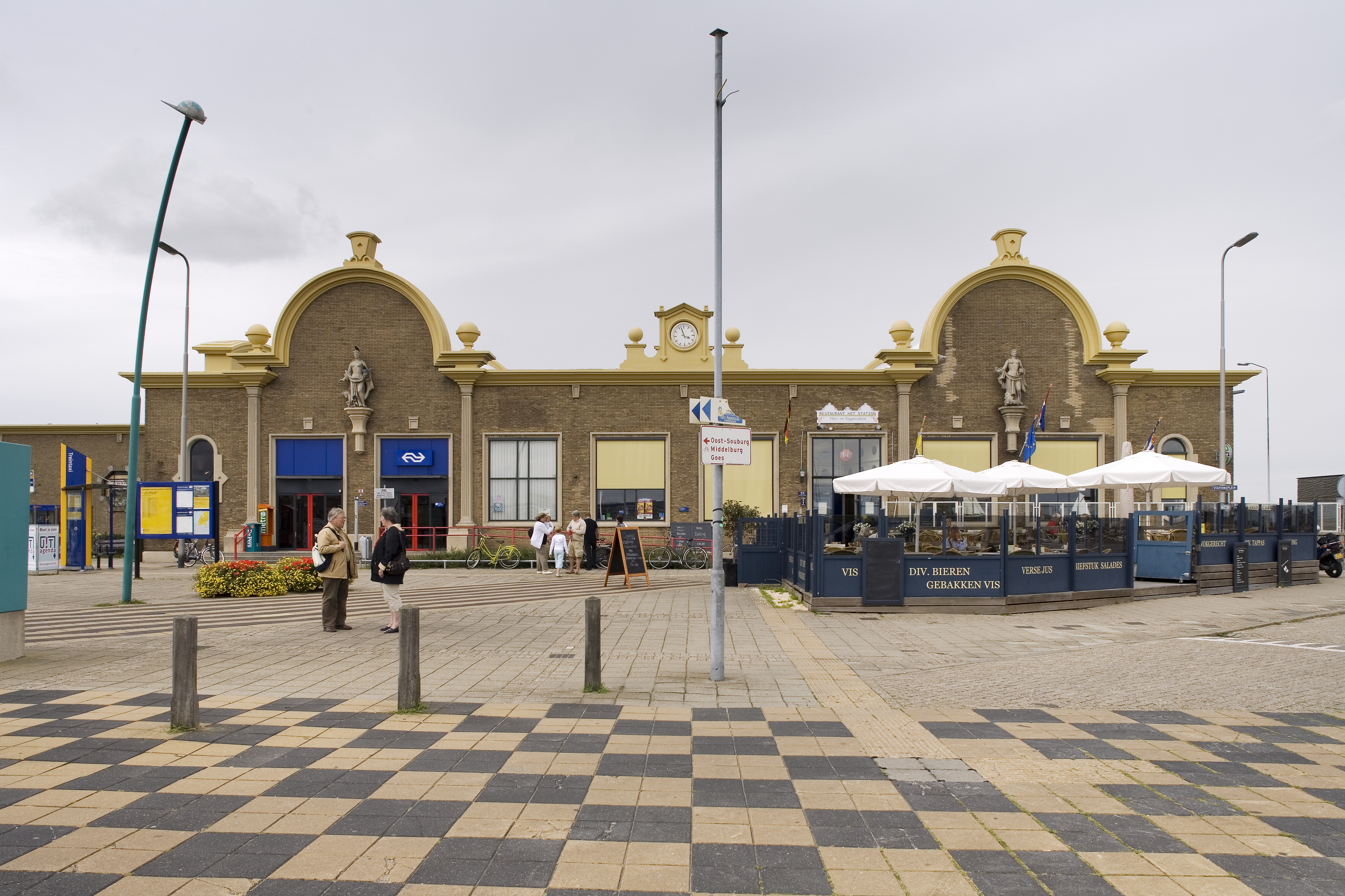 NS-Station: Overzicht van de voorgevel met terras.